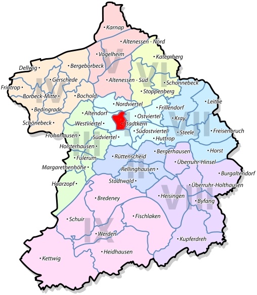 Lage des Essener Stadtteils Altendorf, Karte